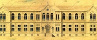 Projecto da Santa Casa da Misericórdia de Passos da autoria do arquitecto Ramos de Azevedo